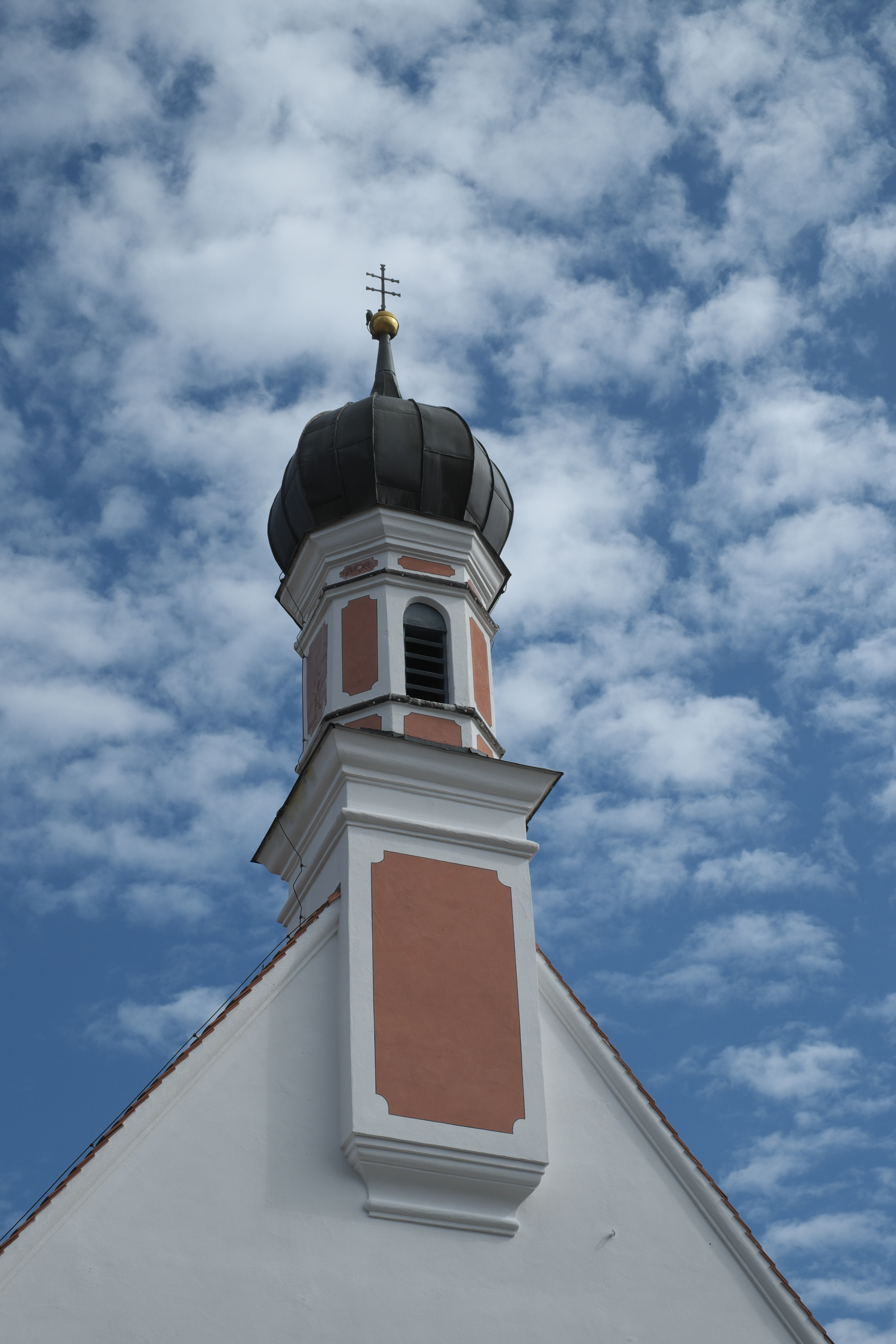 Katholische Kapelle St. Antonius, St.-Anton-Weg 1, in Denklingen im Landkreis Landsberg am Lech (Bayern/Deutschland), Dachreiter